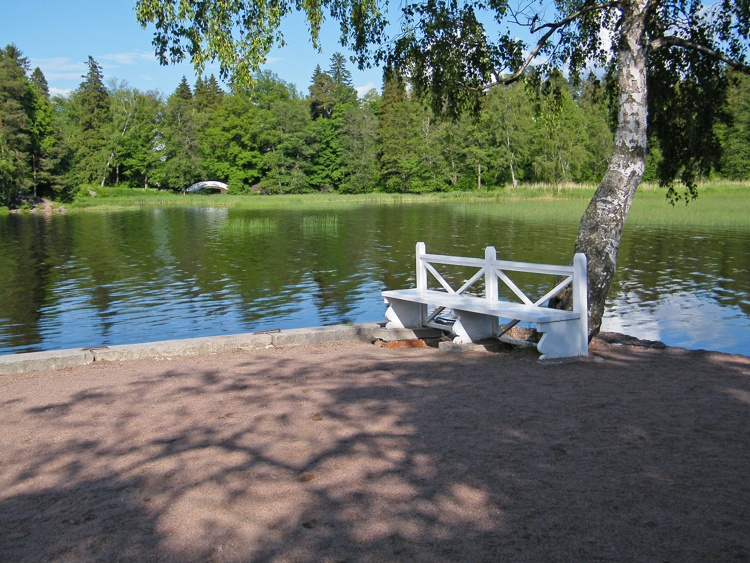 Скамейка в парке Монрепо